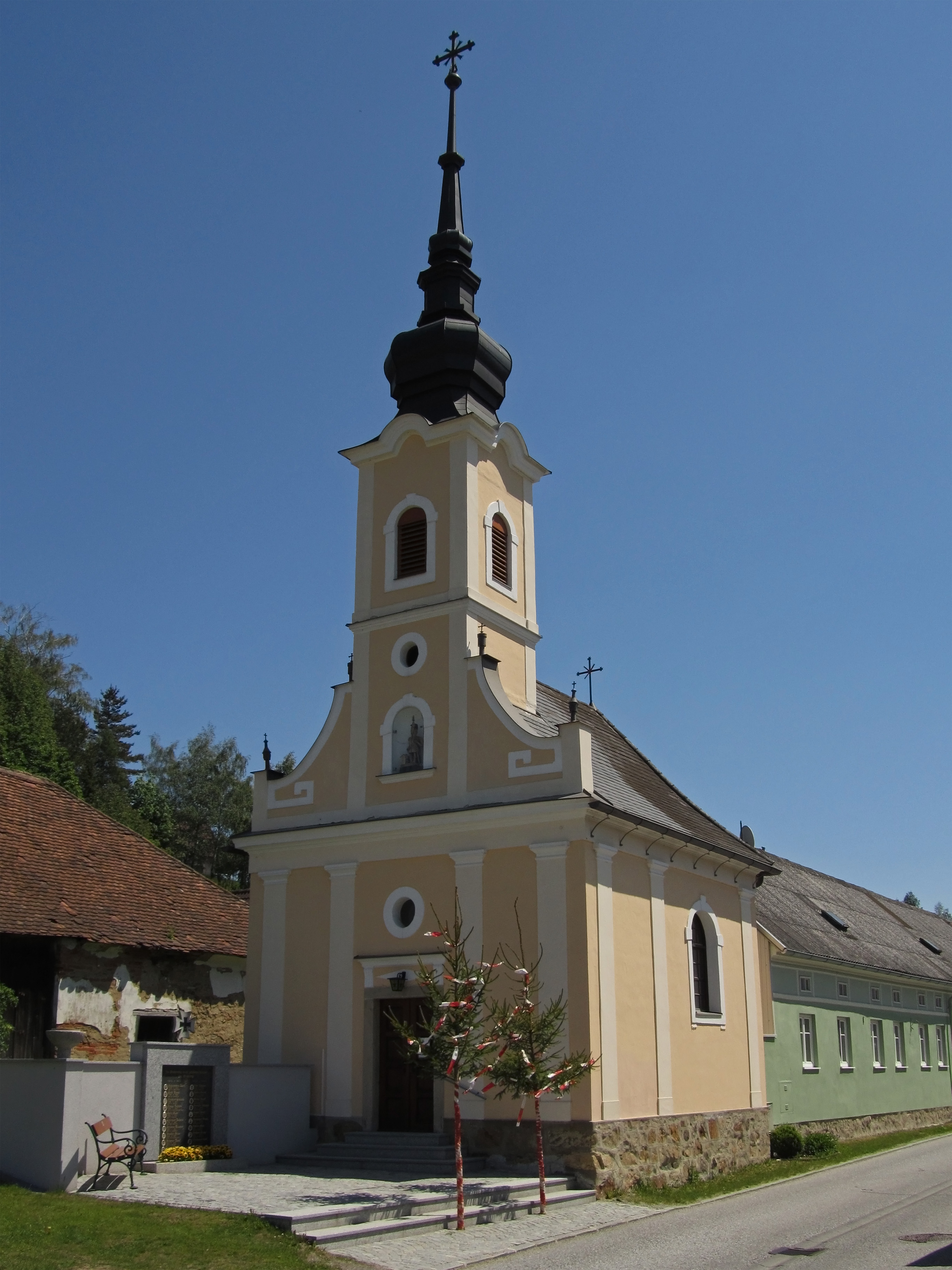 Barockisierende Kapelle von 1846 mit gefaschten Rundbogenfenstern, Halbkreisapsis und umlaufender Pilastergliederung. Fassadenturm mit Figurennische, Faschengliederung und Zwiebelhelm nach Brand 1883 erneuert.